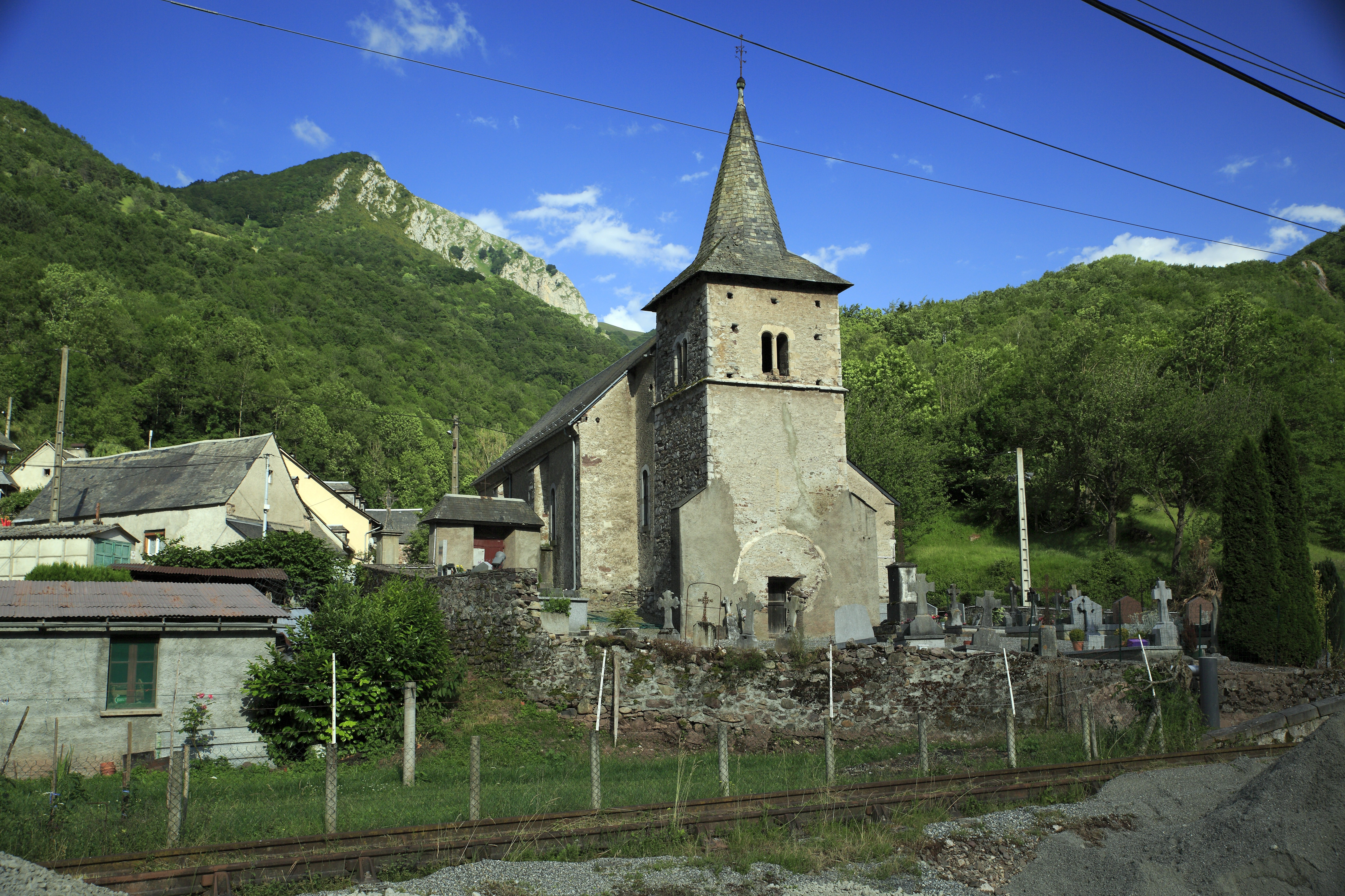 Saint-Laurent, eigentlich ist die Kirche ein romanischer Bau. Der Turm wurde jedoch erst etwa 1600 hinzugefügt und in der Weihnachtsnacht 1858 brannte die Kirche ab. Der Bau ist danach wiederaufgebaut worden.